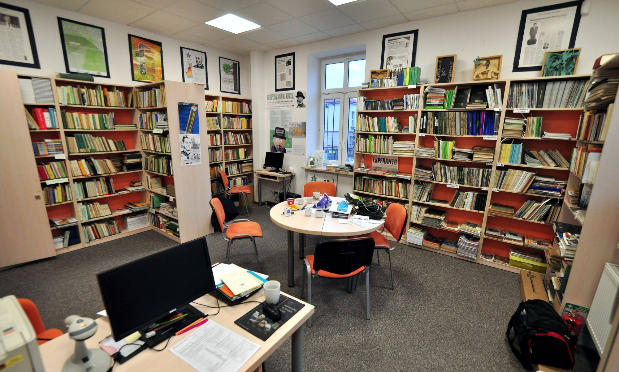 Wnętrze biblioteki esperanckiej - Esperanto-Libraro, filii Książnicy Podlaskiej